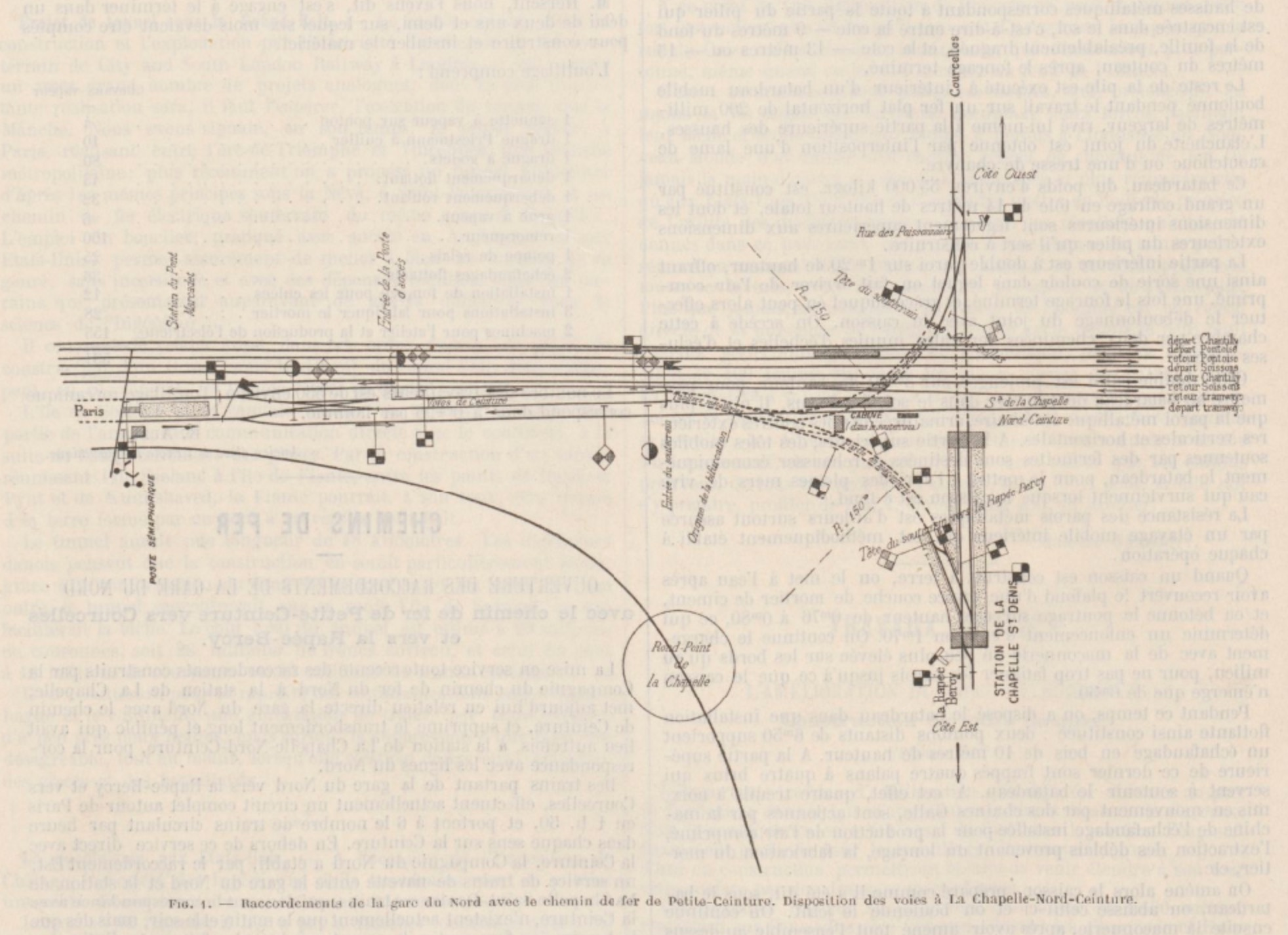 Schéma du raccordement ferroviaire de la gare de Paris-Nord à la ligne de Petite-Ceinture.